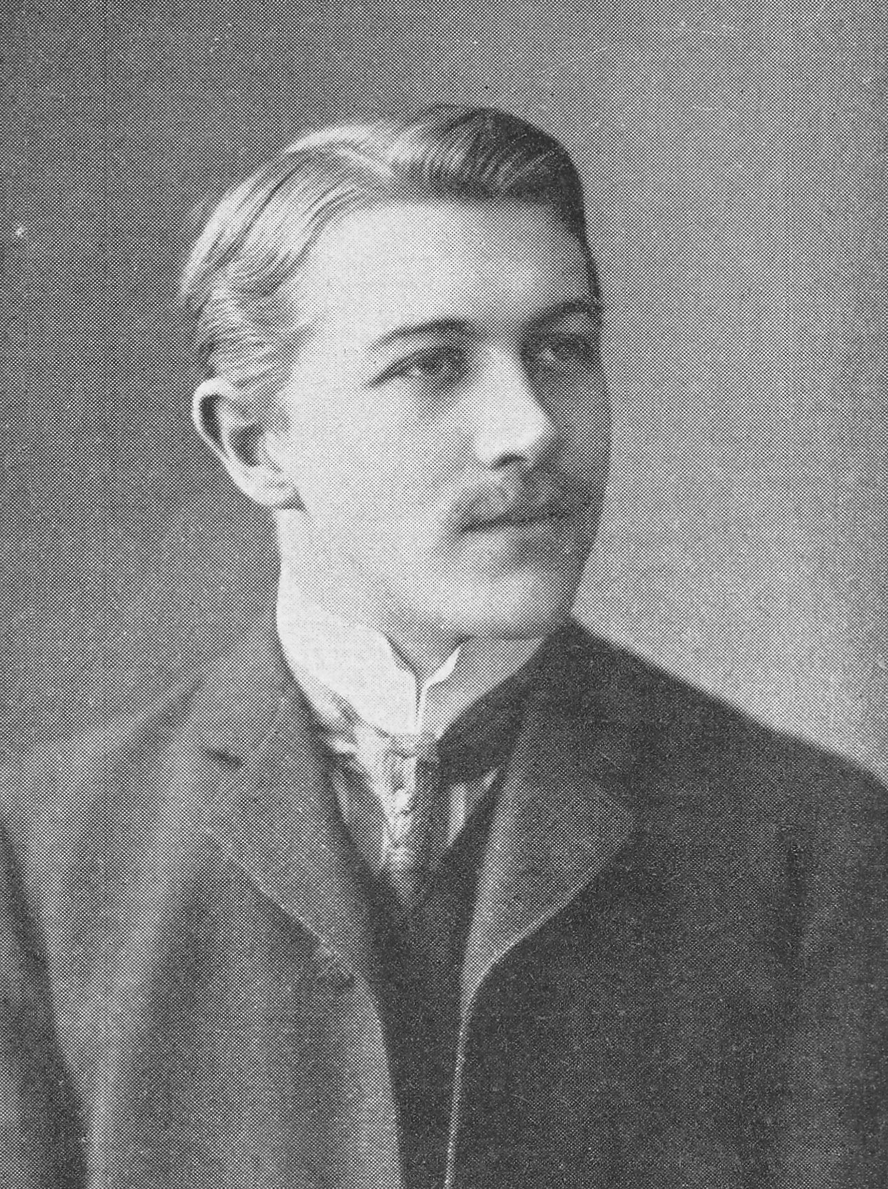 Fredy Budzinski, deutscher Sportjournalist (1879-1970), Chefredakteur der Rad-Welt 1912-1911